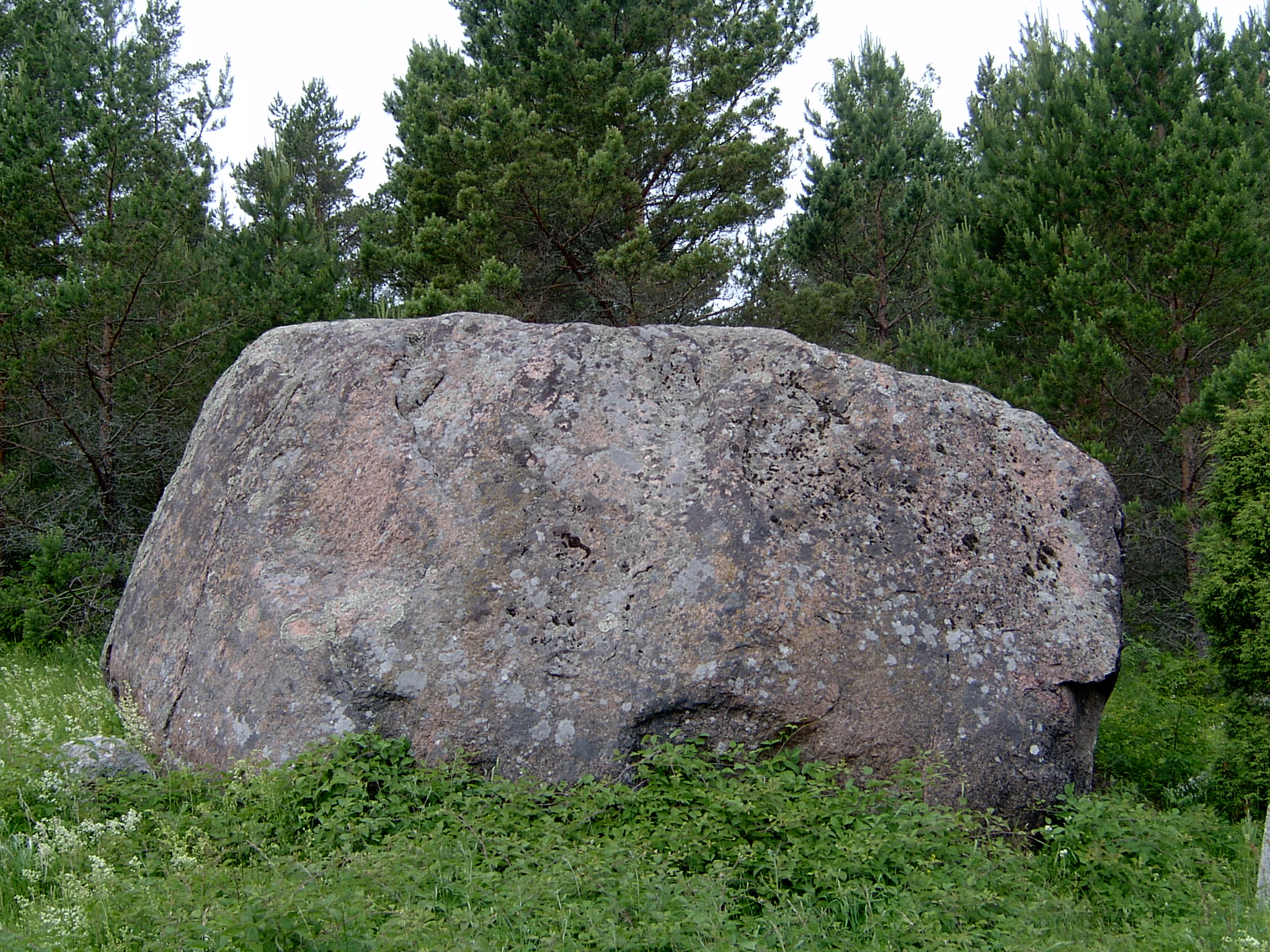 Tubala kivi. Hiiumaa, Eesti.